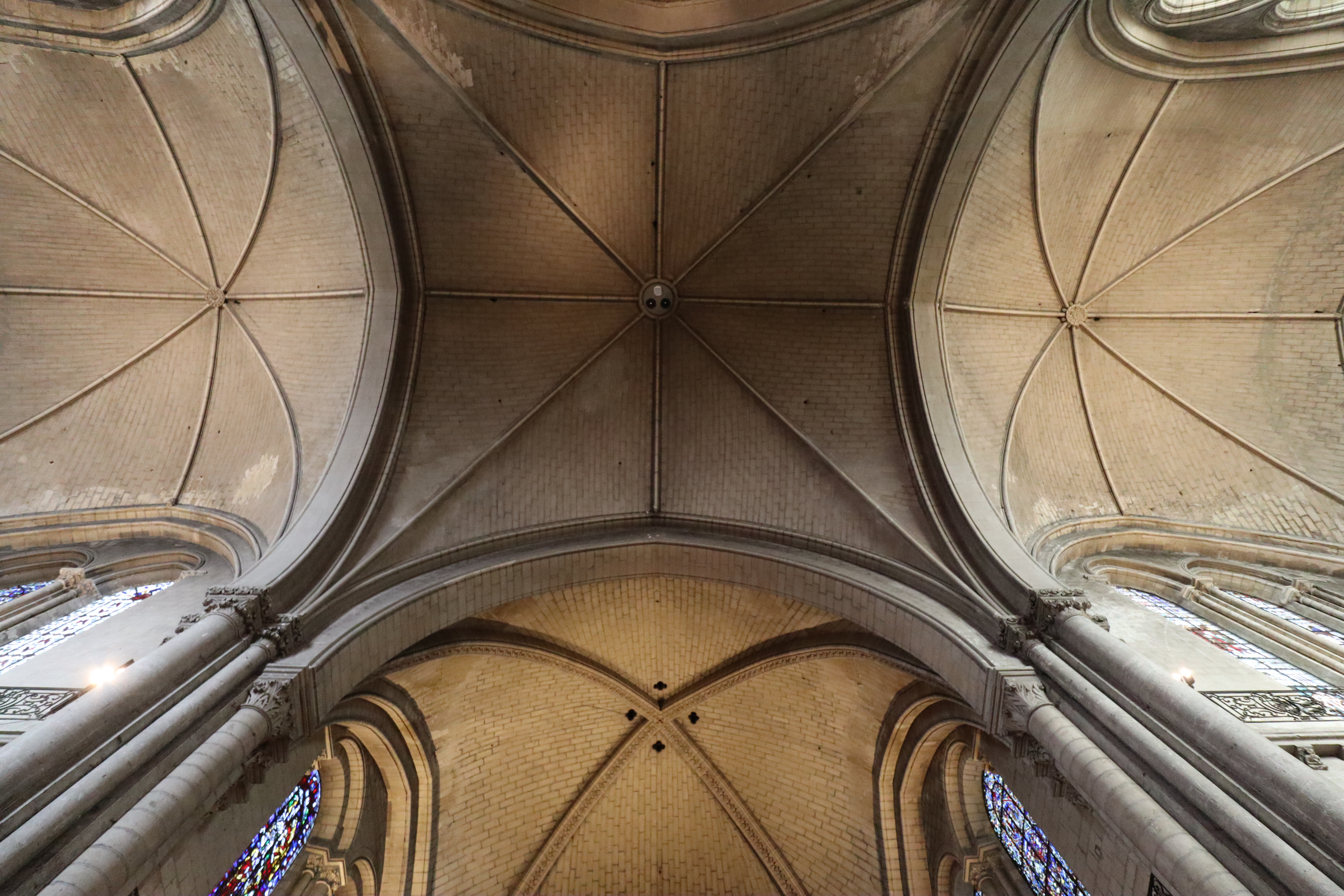 Voûtes du transept de la cathédrale Saint-Maurice d'Angers (49).